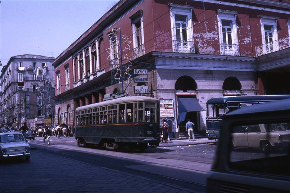 Napoli, Corso Garibaldi. Vecchia Stazione della Circumvesuviana. Autore sconosciuto.